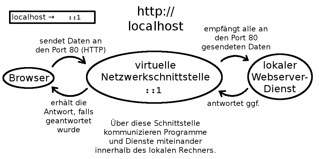 Bild zum Artikel localhost, nur etwas aktueller